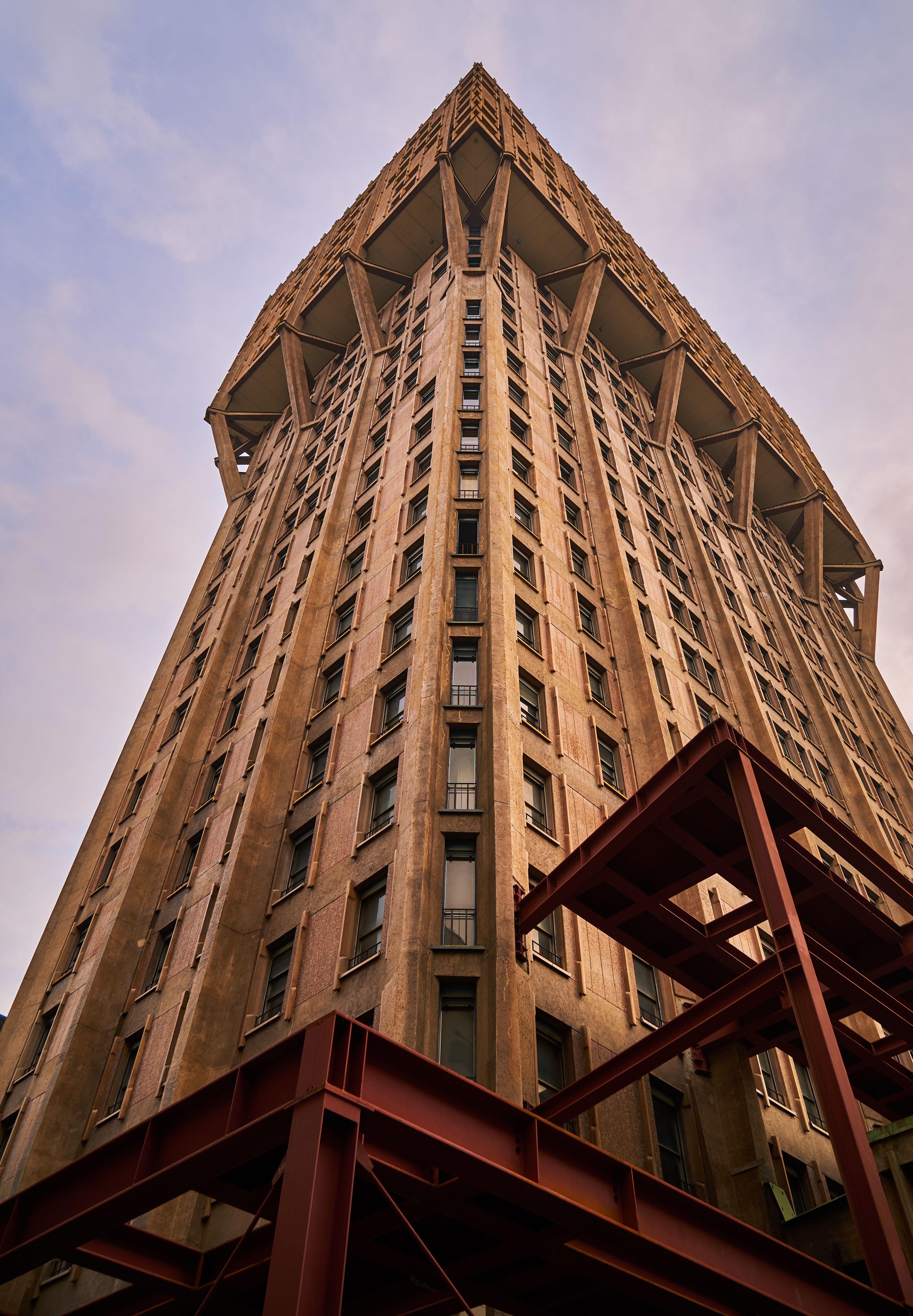 Torre Velasca